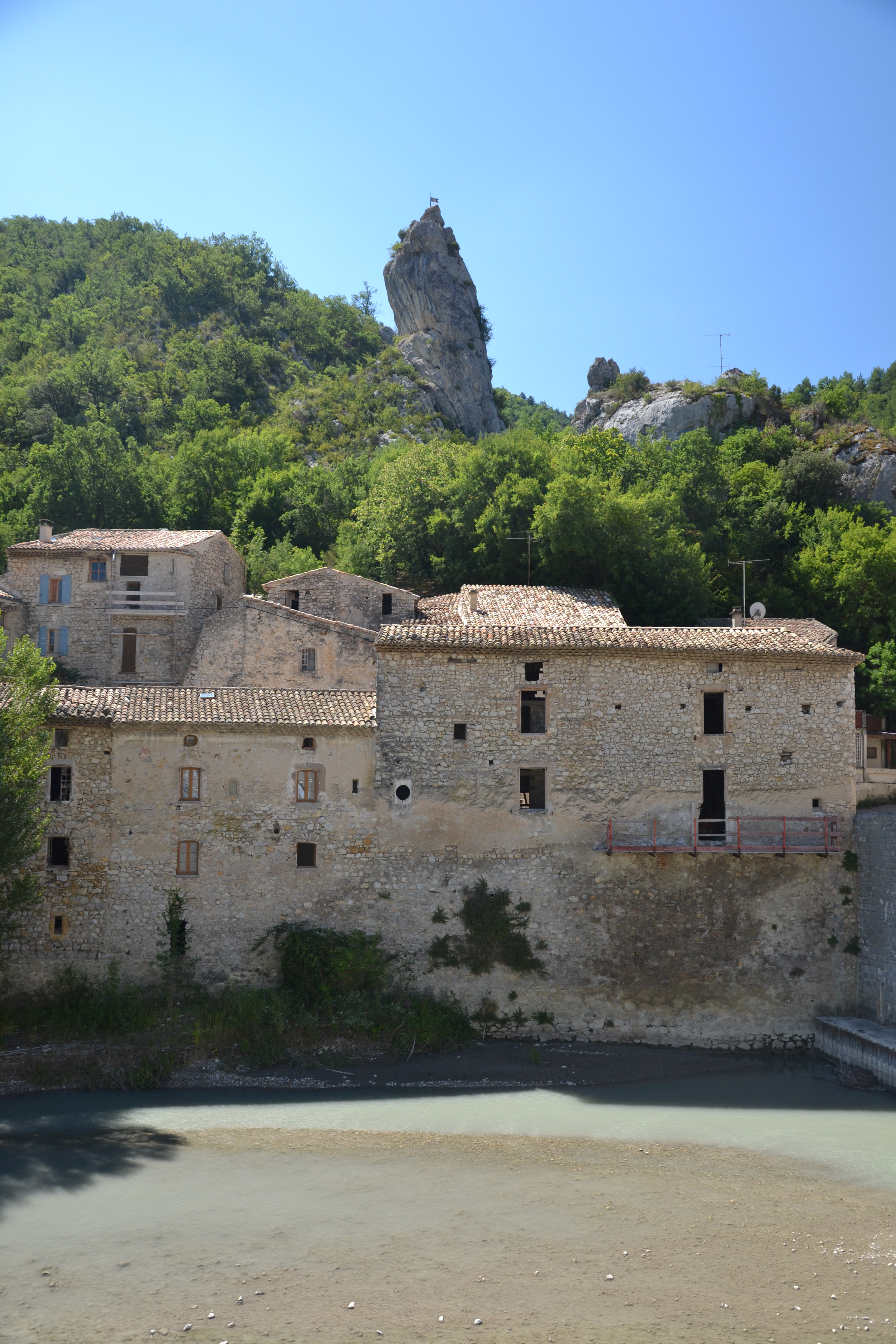 vue sur une partie du village des Pilles